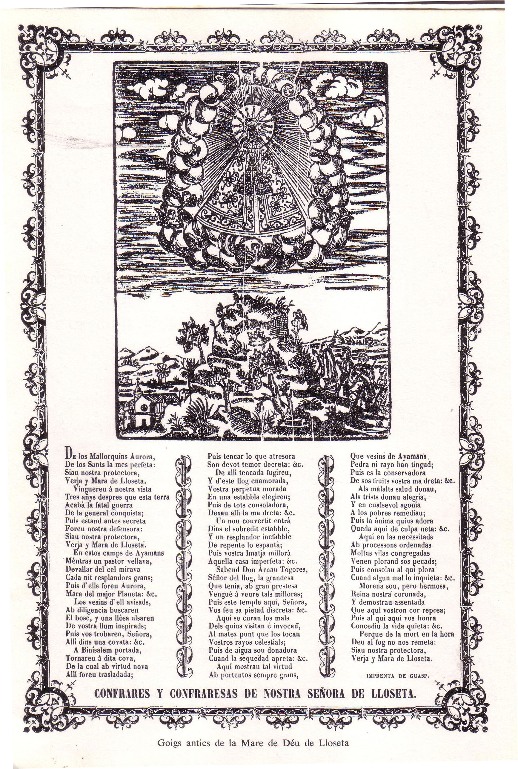 DGoigs en honor de la Mare de Déu del Cocó